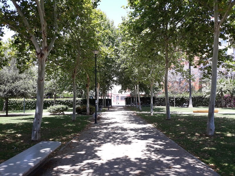 Vista del Instituto Isbilya desde el Parque Agumore